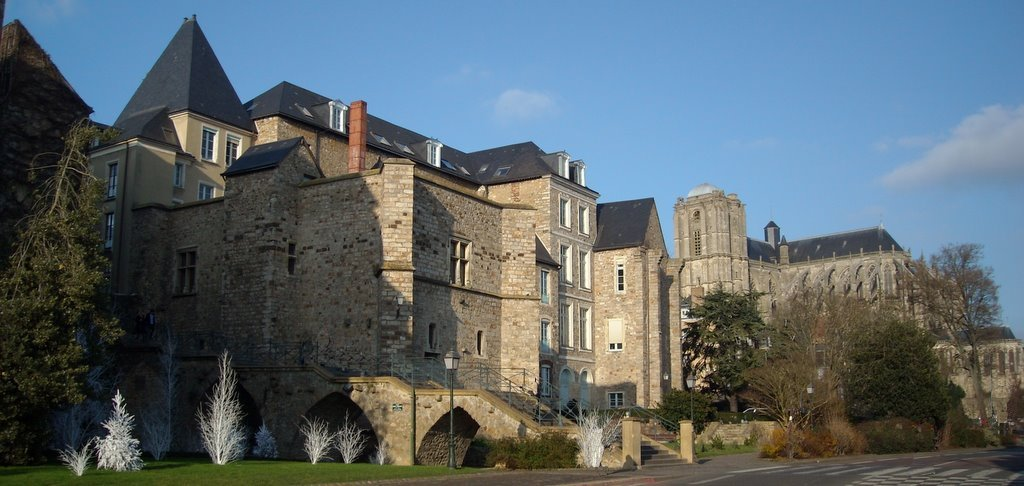 Mairie du Mans (ancien palais des comtes du Maine) et cathédrale Saint-Julien